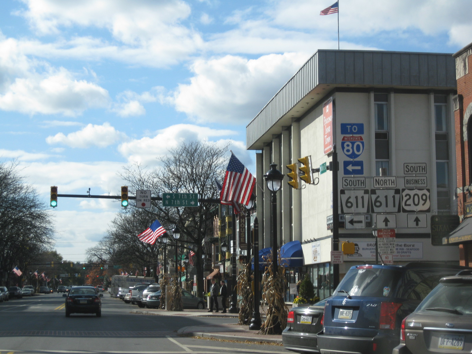 Stroudsburg, Pennsylvania